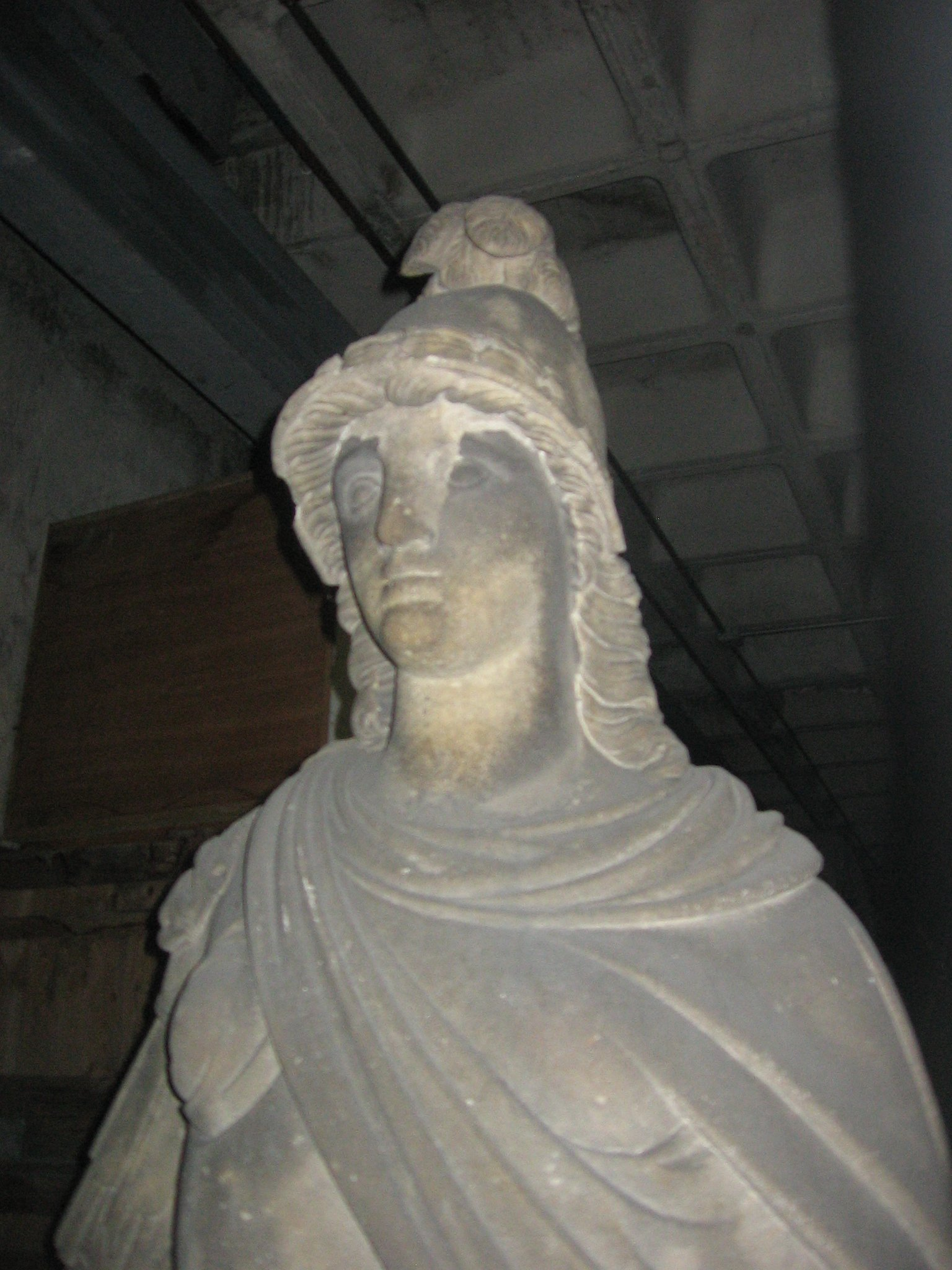 Minerva, de Salvador Gurri. Formó parte de la Fuente del Viejo; actualmente está en un almacén municipal.